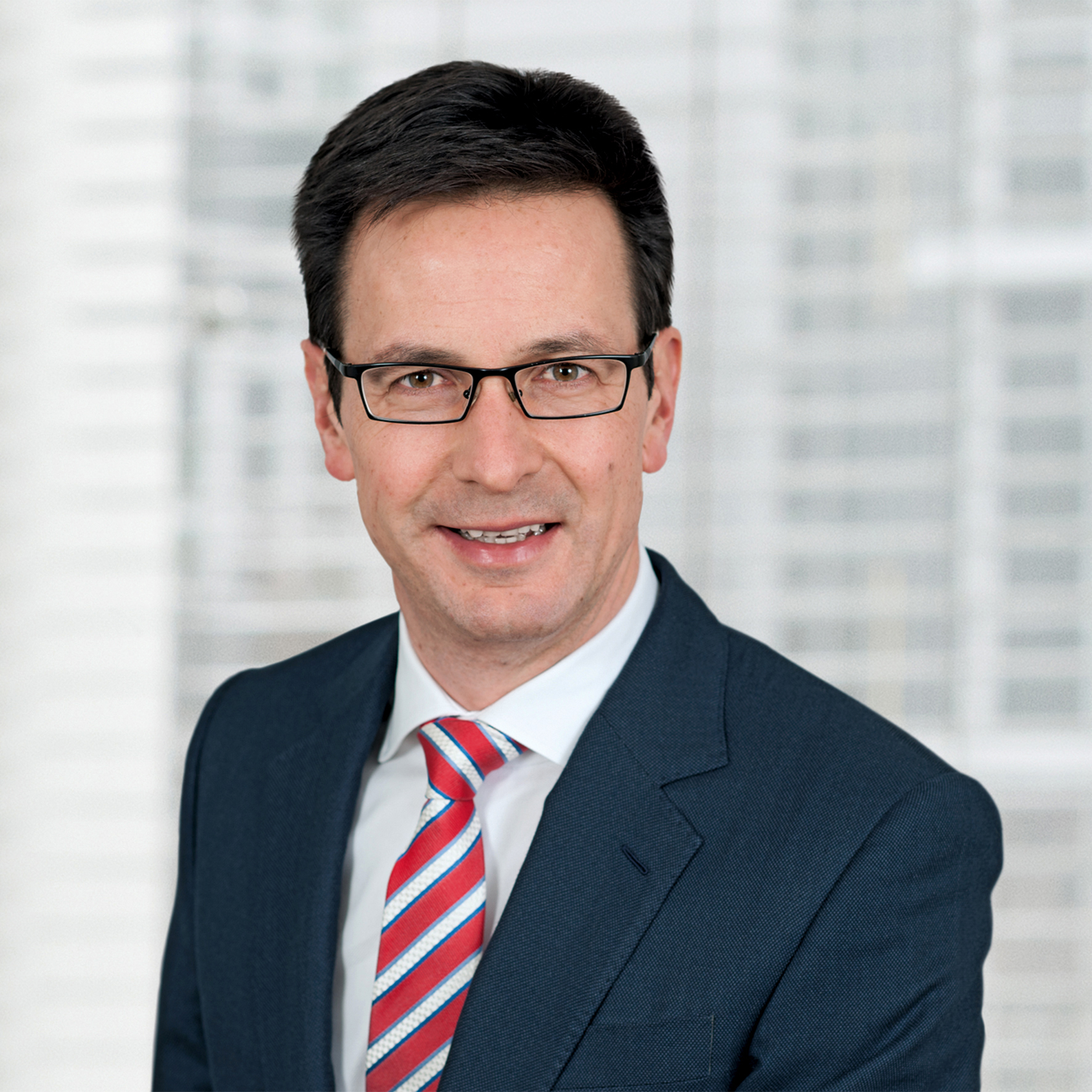 Dr. Bernhard Günther, Vorstand RWE AG, seit 2016 Finanzvorstand Innogy SE